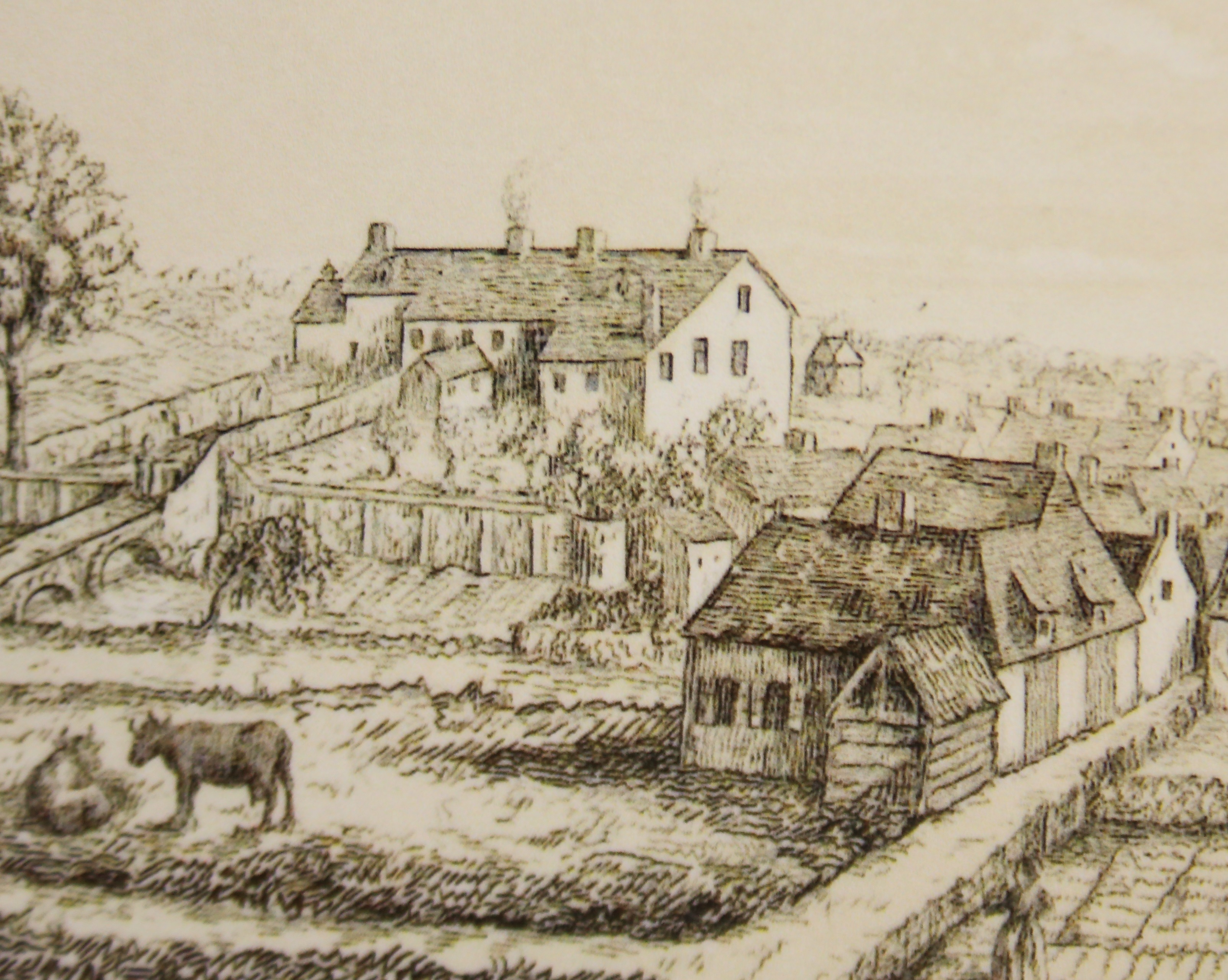 Egmontkasteel, Zottegem, Vlaanderen, België (in: 'Gedenkbeelden van Lamorael van Egmond', L.J. Van Peteghem, 1853)